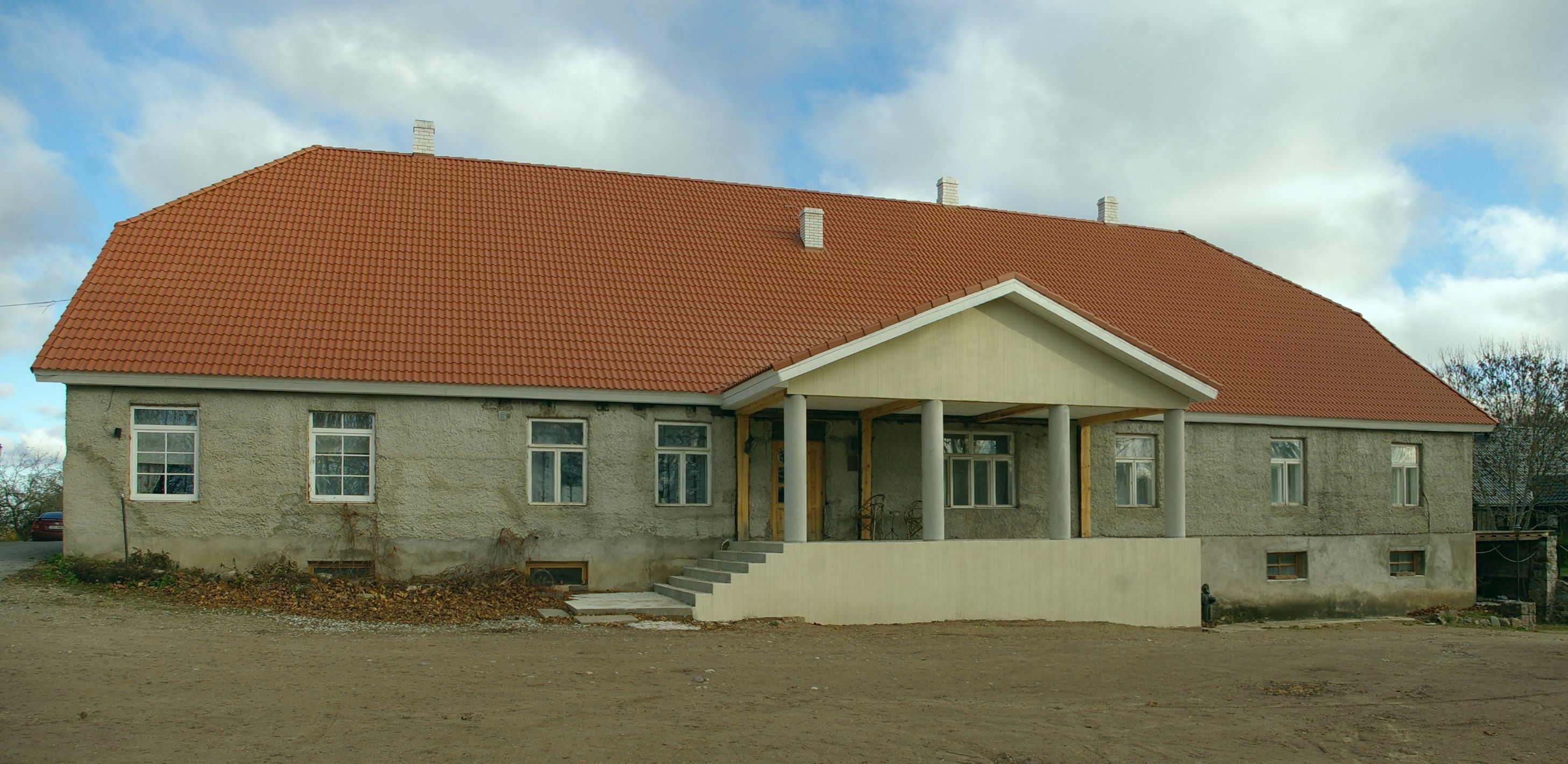 Kadrina mõisahoone